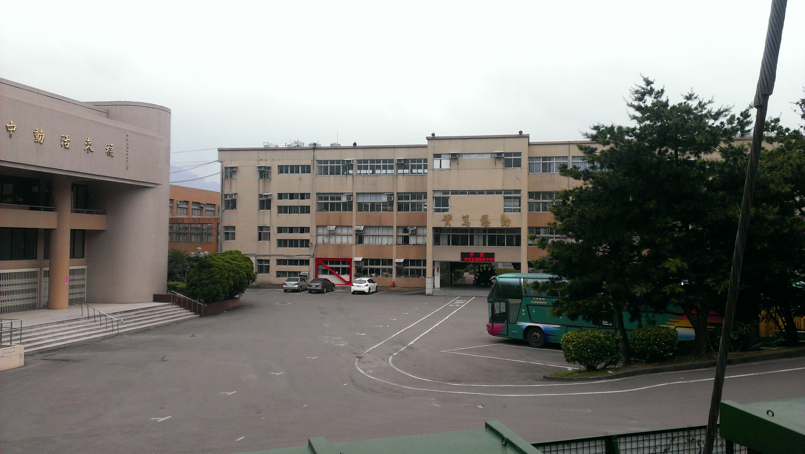 東泰高中行政大樓